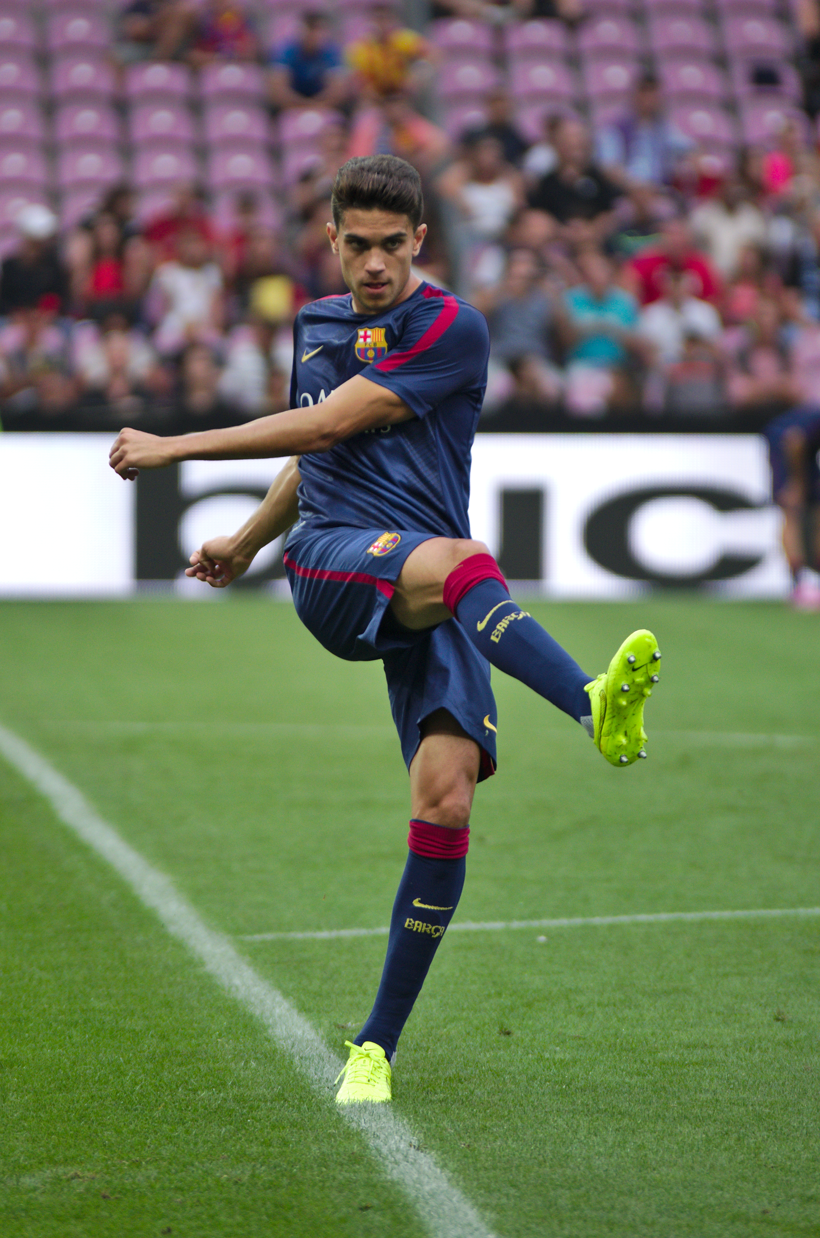 Barça - Napoli - 20140806 - Marc Bartra